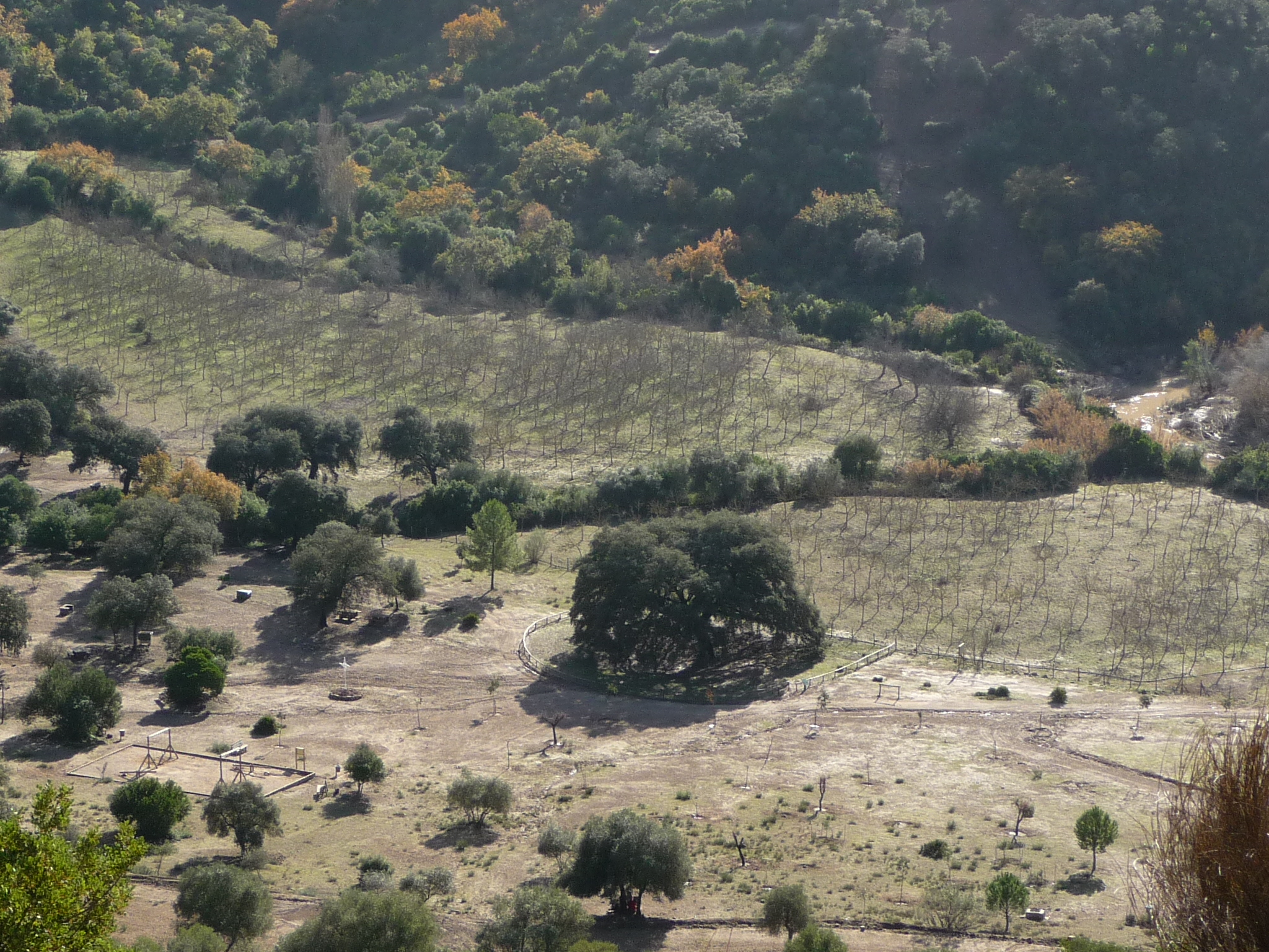 ChaparroDeLaVega-P1050928.JPG